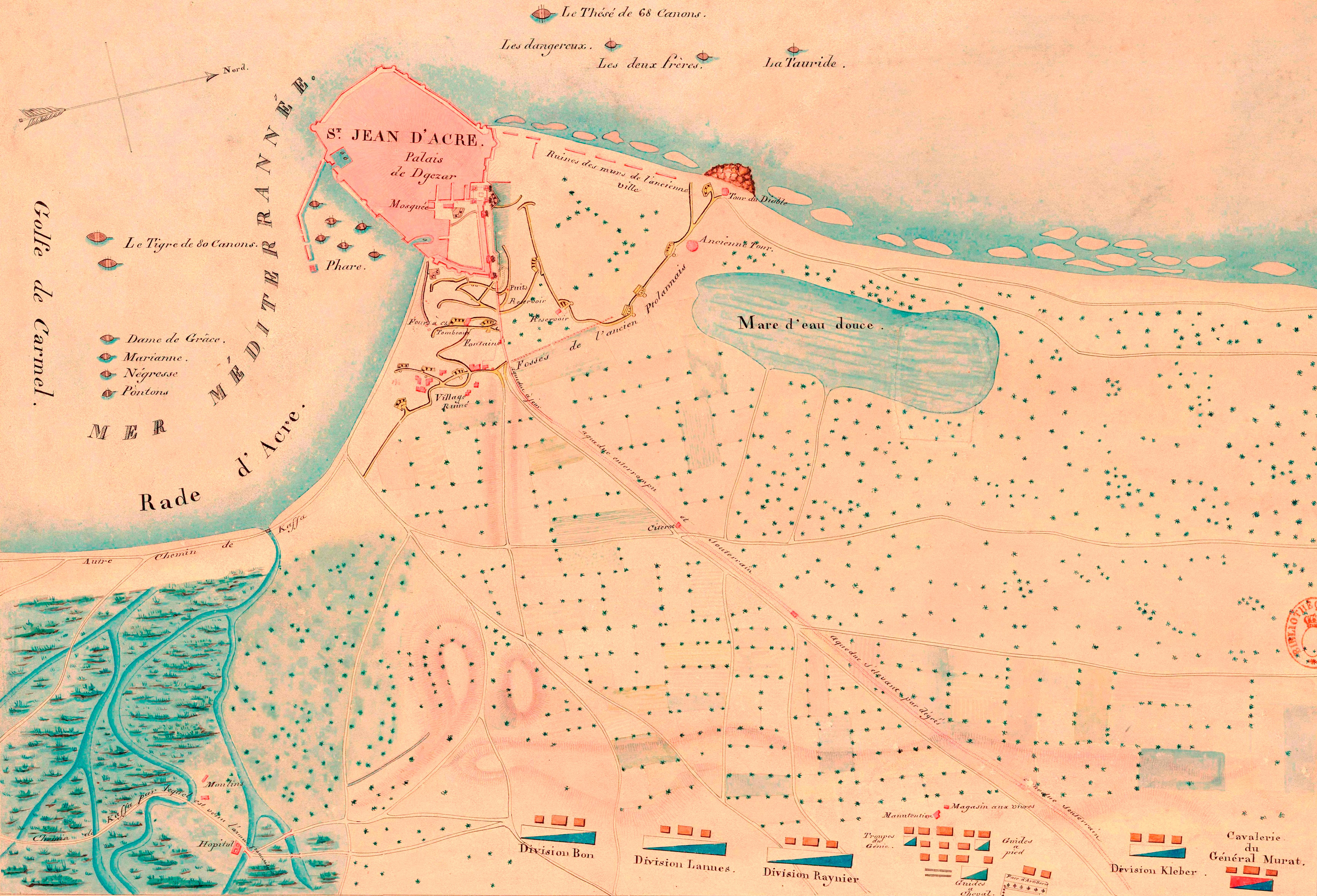 Plan de St. Jean d'Acre. indiquant la position de l'armée française et des ouvrages qui ont servi au siège de cette place comanée le 29 Ventose An 7 et levé le 30 Floréal même année